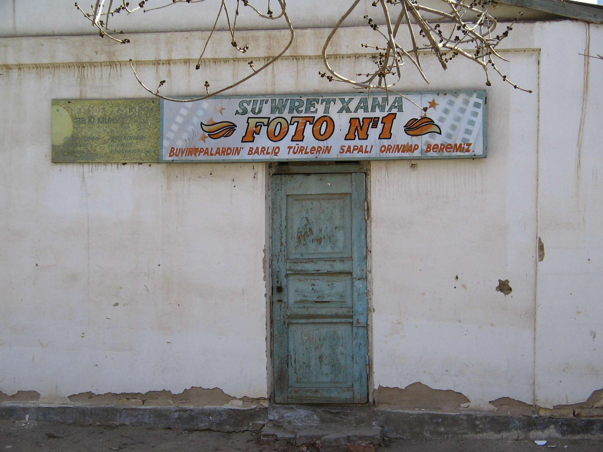 Образец современной каракалпакской письменности - вывеска фотосалона в Нукусе